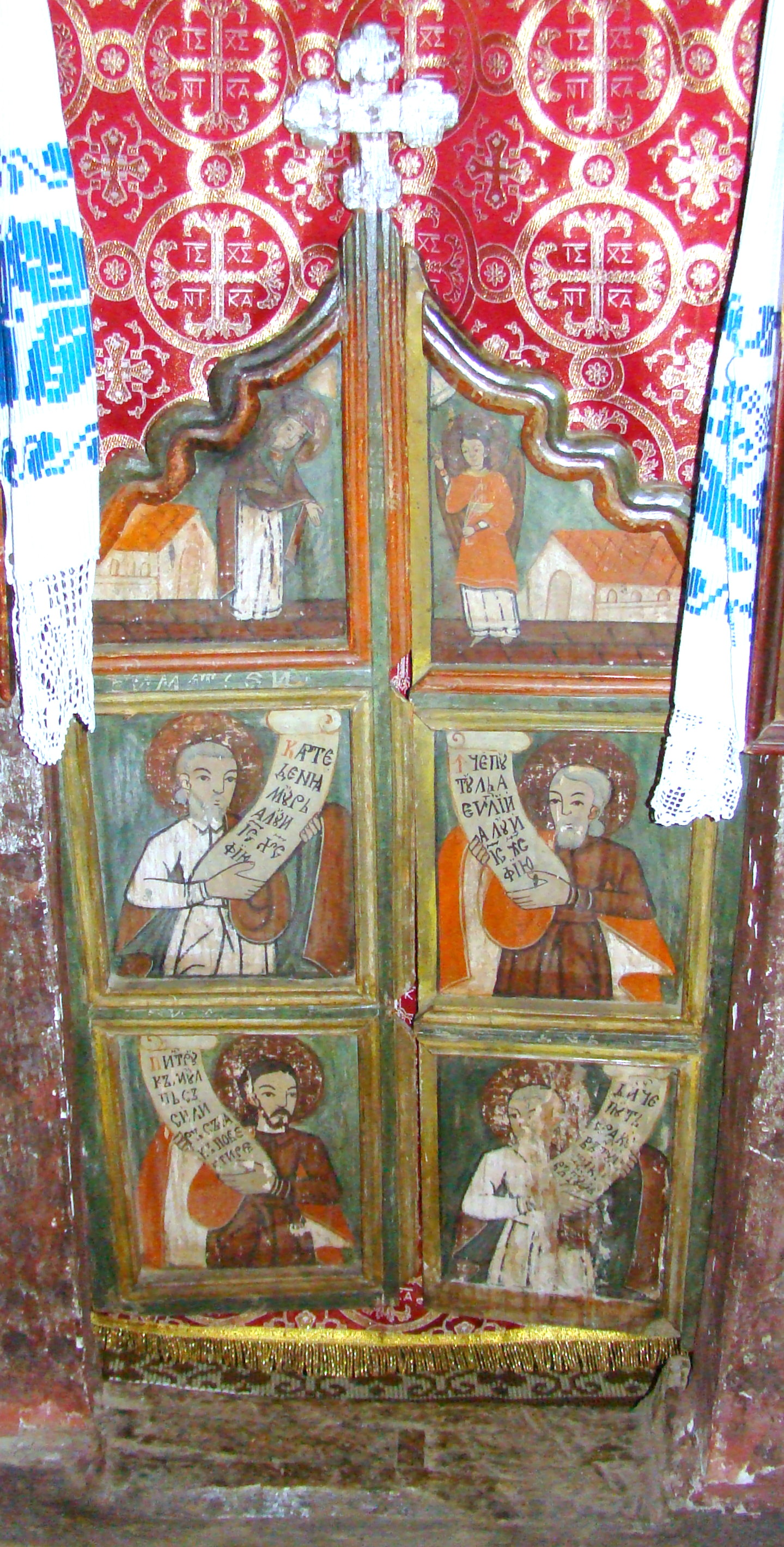 Biserica de lemn „Sfinții Arhangheli Mihail și Gavriil” din Sic, comuna Sic, județul Cluj